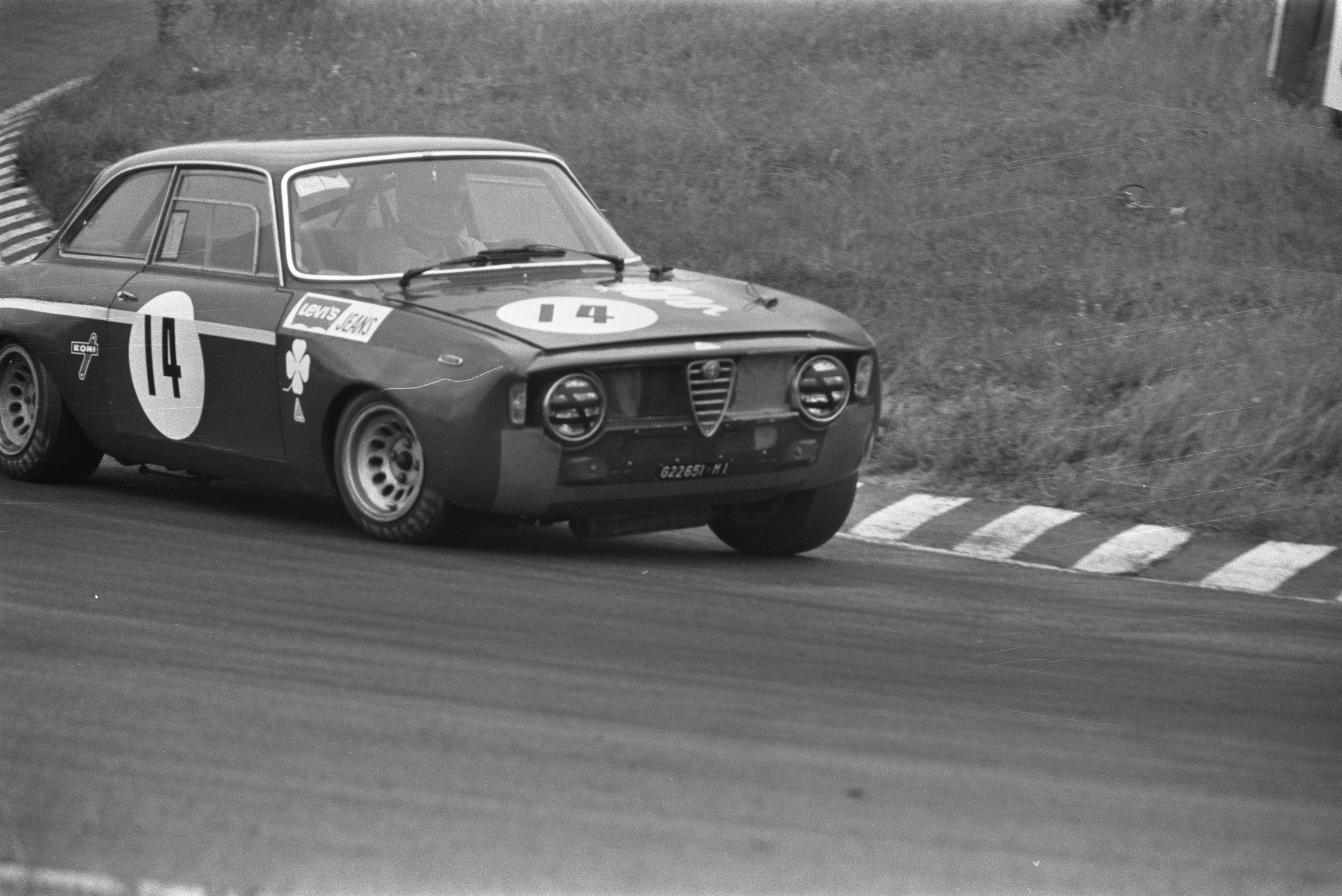 Collectie / Archief : Fotocollectie Anefo Reportage / Serie : [ onbekend ] Beschrijving : Autoraces om Zandvoort Trophy Datum : 29 augustus 1971 Trefwoorden : AUTORACES Fotograaf : Peters, Hans / Anefo Auteursrechthebbende : Nationaal Archief Materiaalsoort : Negatief (zwart/wit) Nummer archiefinventaris : bekijk toegang 2.24.01.05 Bestanddeelnummer : 924-8746